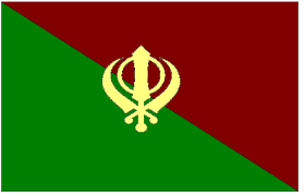 bandera ciudad pakistan